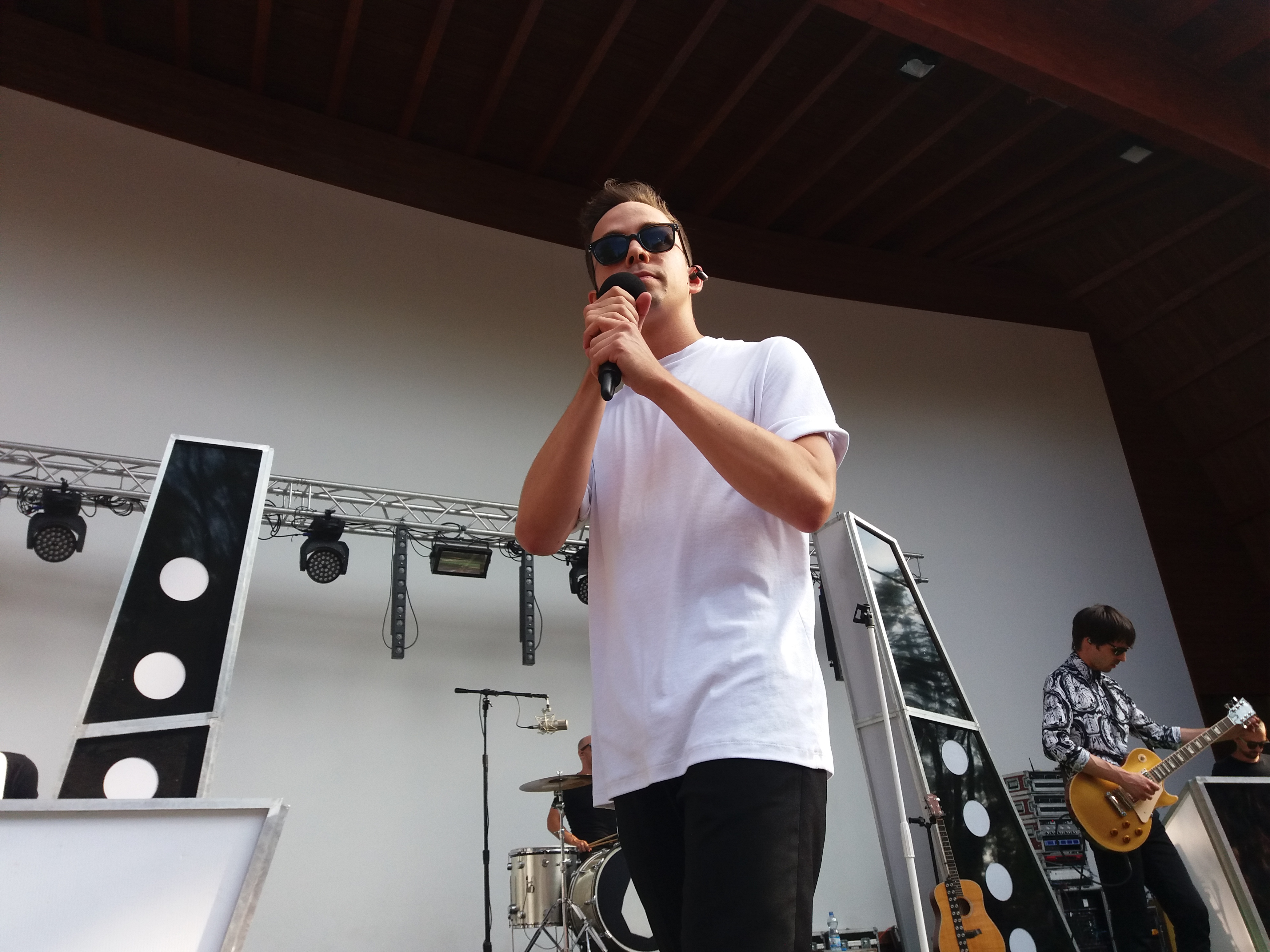 Petr Lexa se skupinou Slza na koncertě ve Valašském Meziřící 03. 06. 2018.